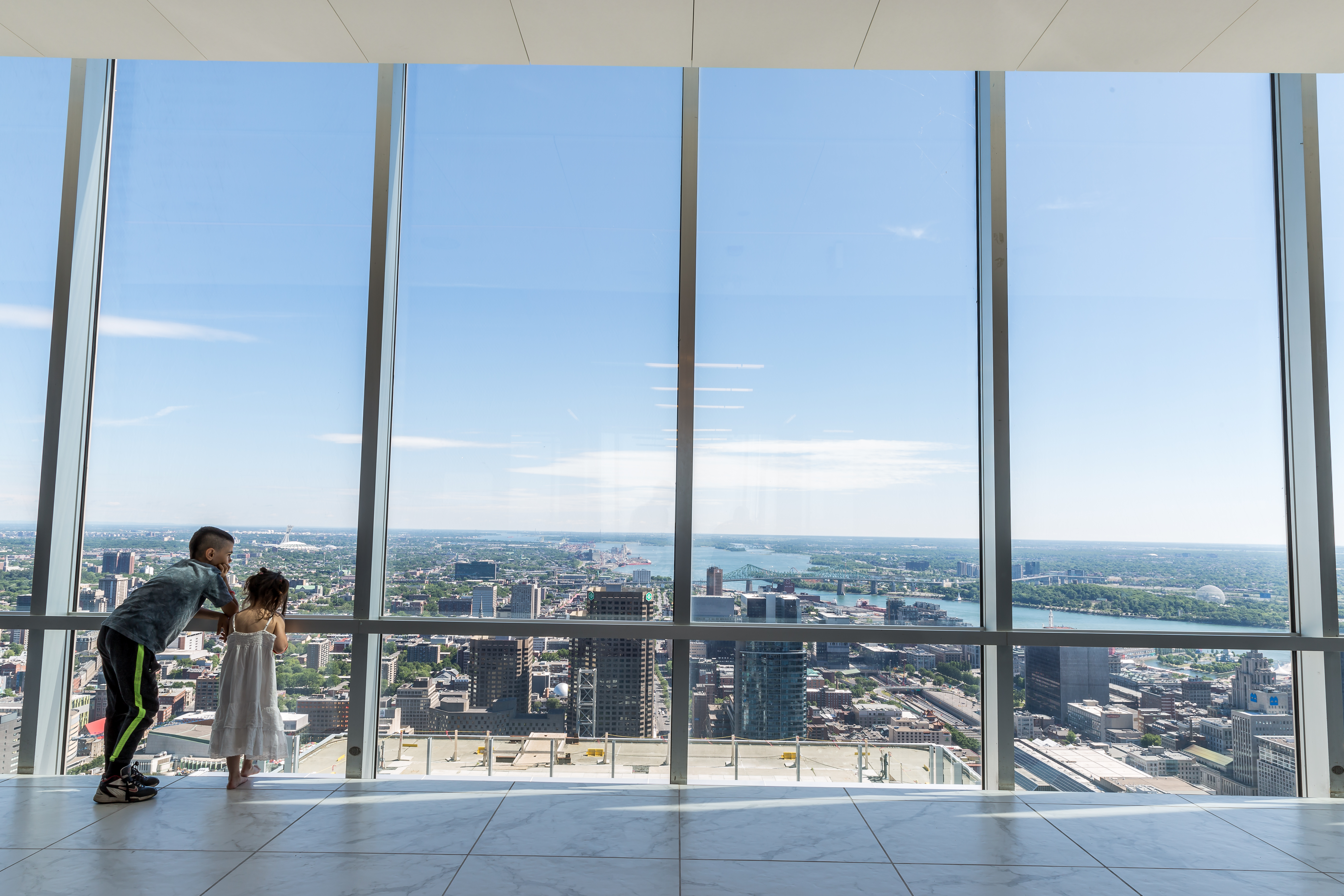 C. Cimon Parent